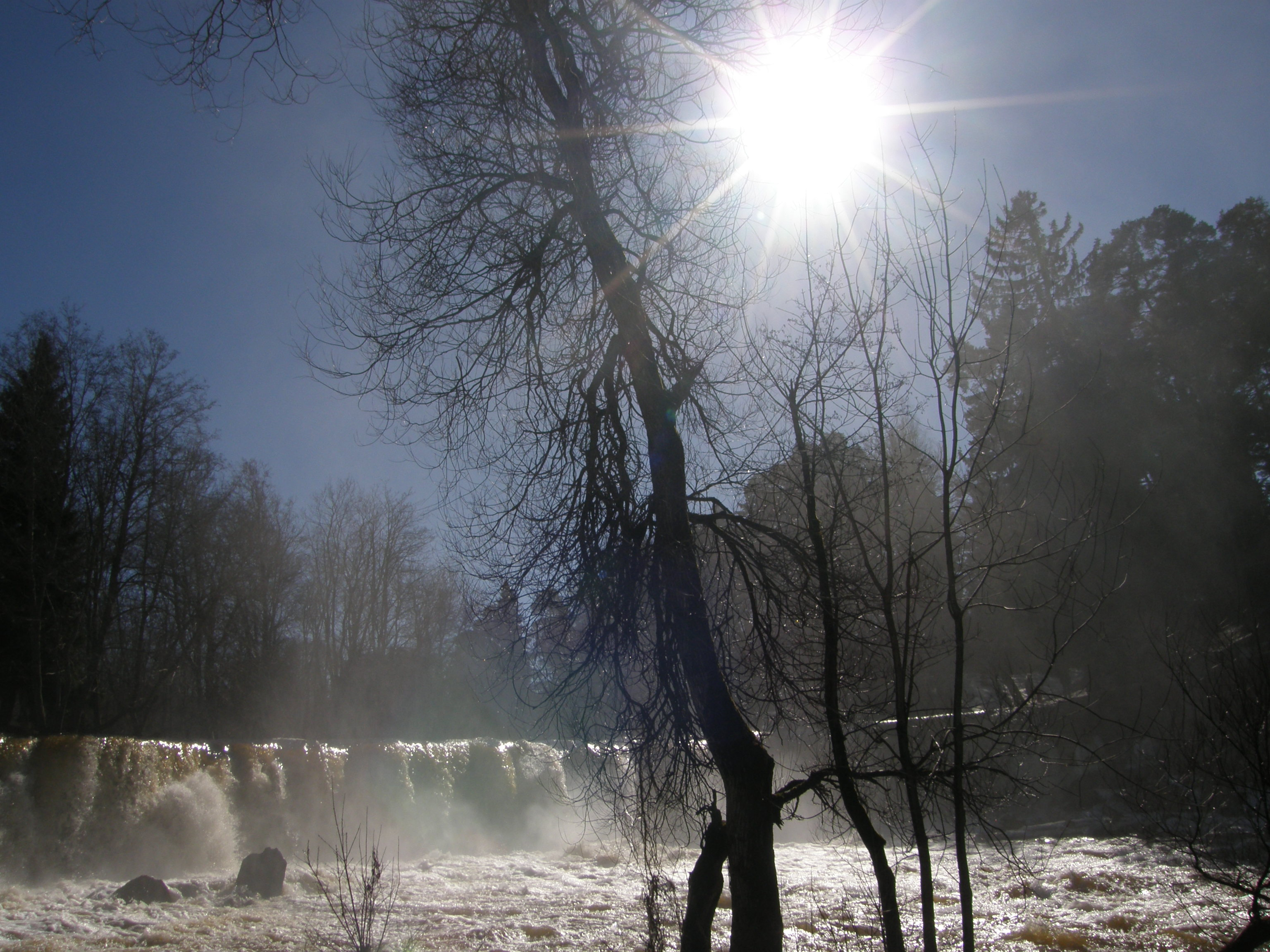 Juga jäätumas külmal talvepäeval Keila-Joal.